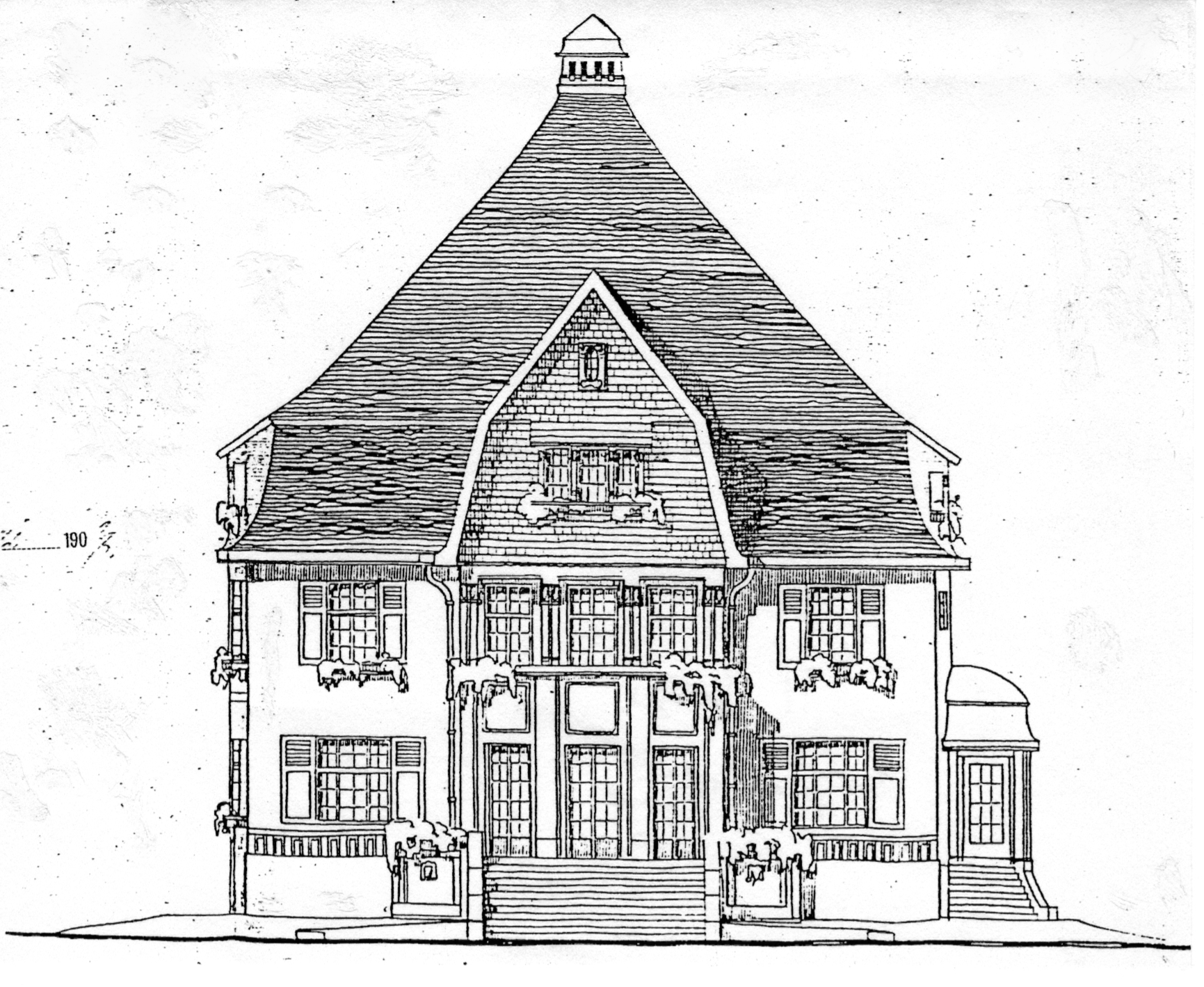 Neubau einer Villa für den Tuchfabrikanten Anton Sager in Neumünster von Architekt Hans Roß